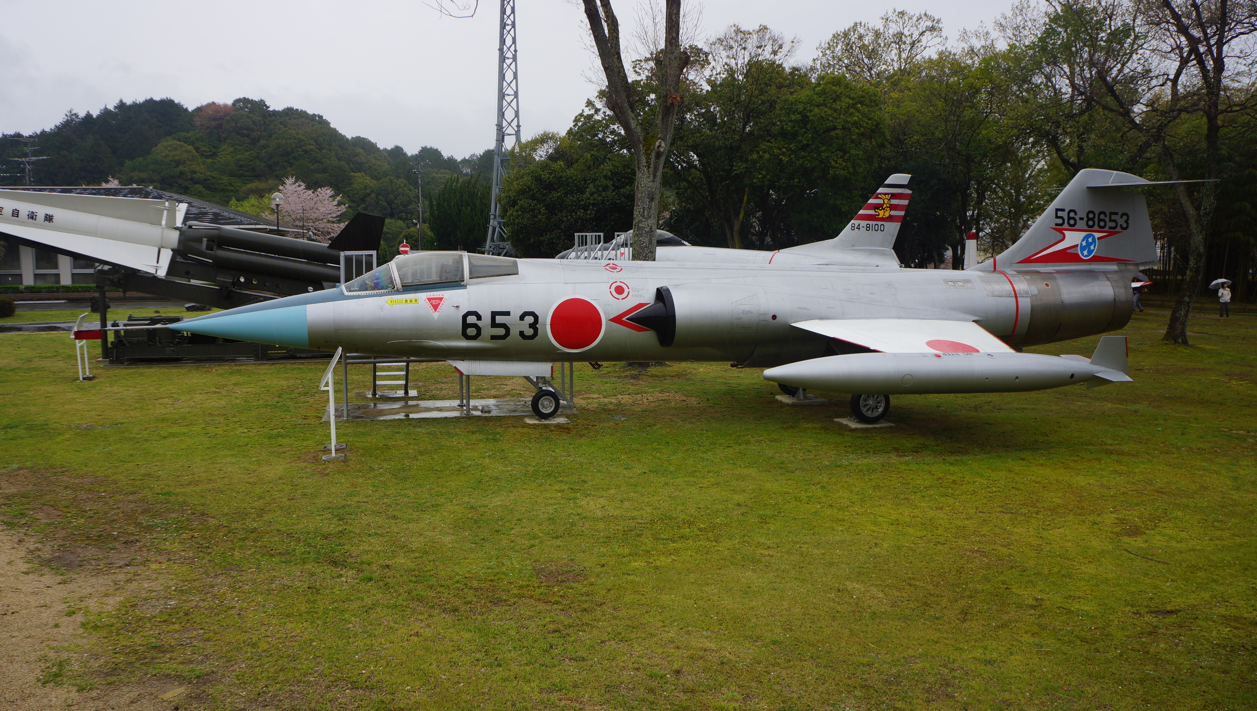 航空自衛隊 F-104J戦闘機。 13年4月6日 航空自衛隊奈良基地にて。